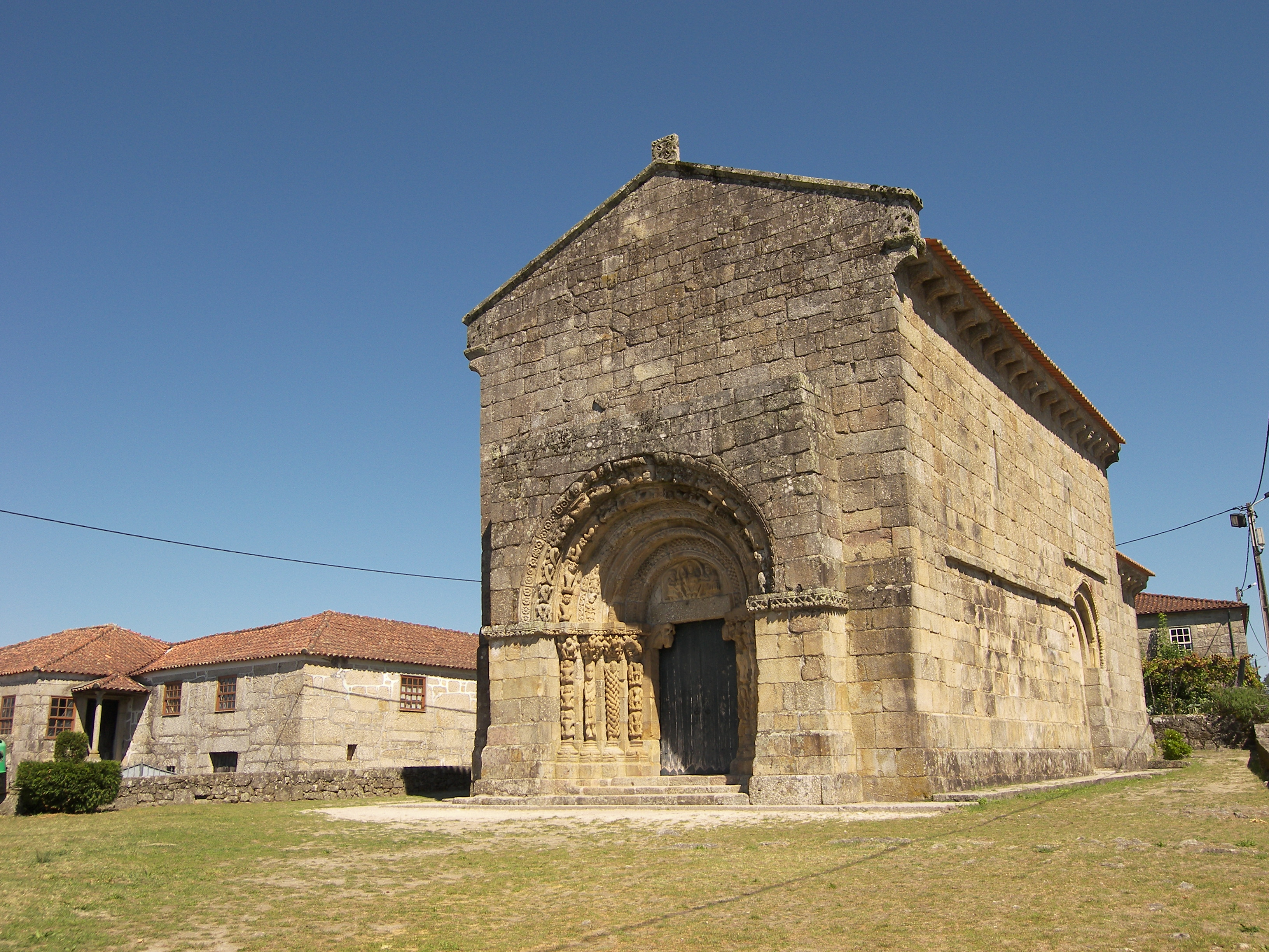 Igreja do Sao Salvador in Bravaes